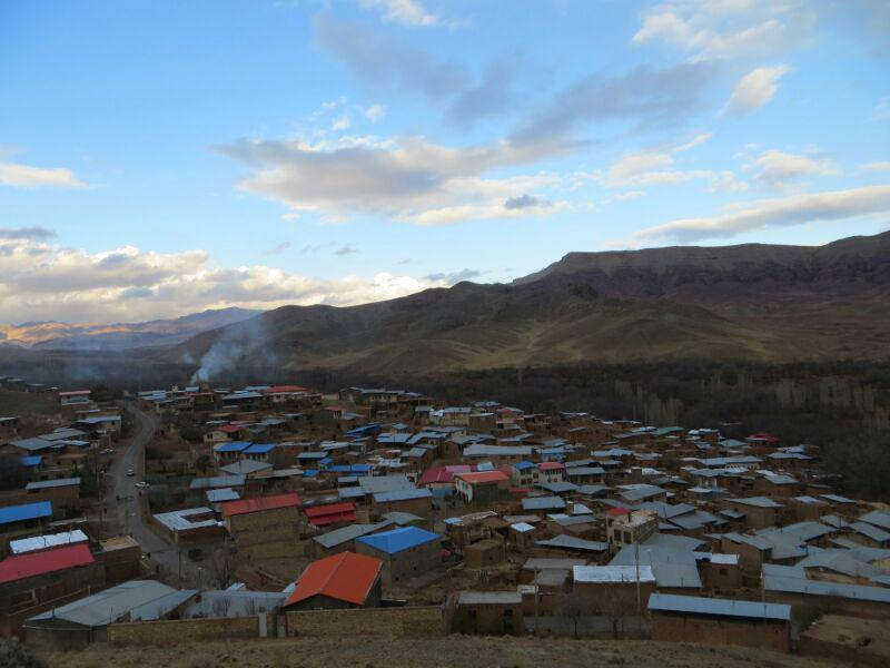 روستای بیجگان دهستان جاسب